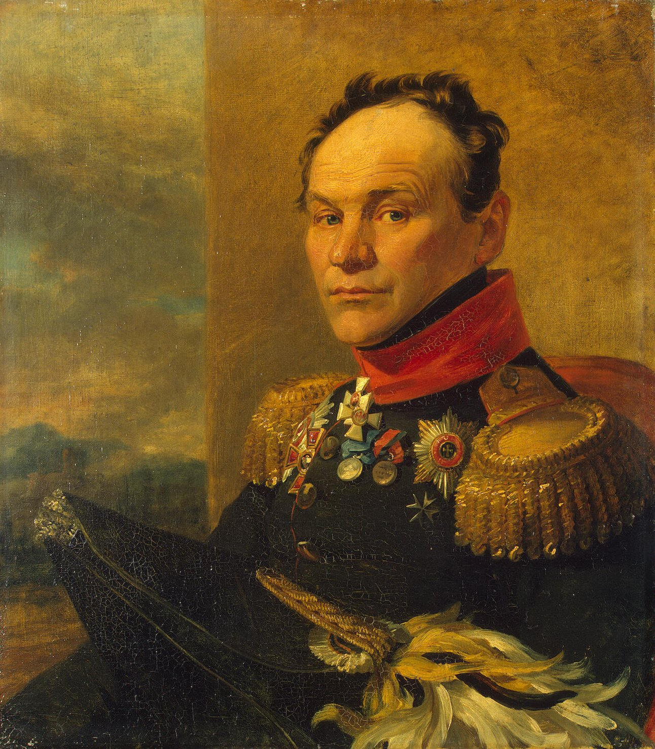 Alexandr Ivanovich Tsvilenyov (1769 – 31.05.1824) russian general